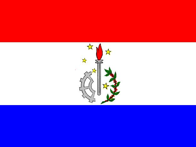 Bandeira do município de Tambaú, estado de São Paulo, Brasil.